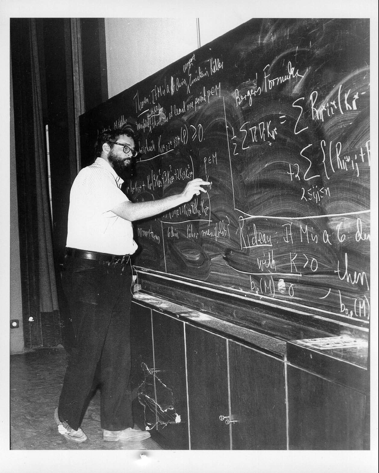 Альфред Грэй в Греции